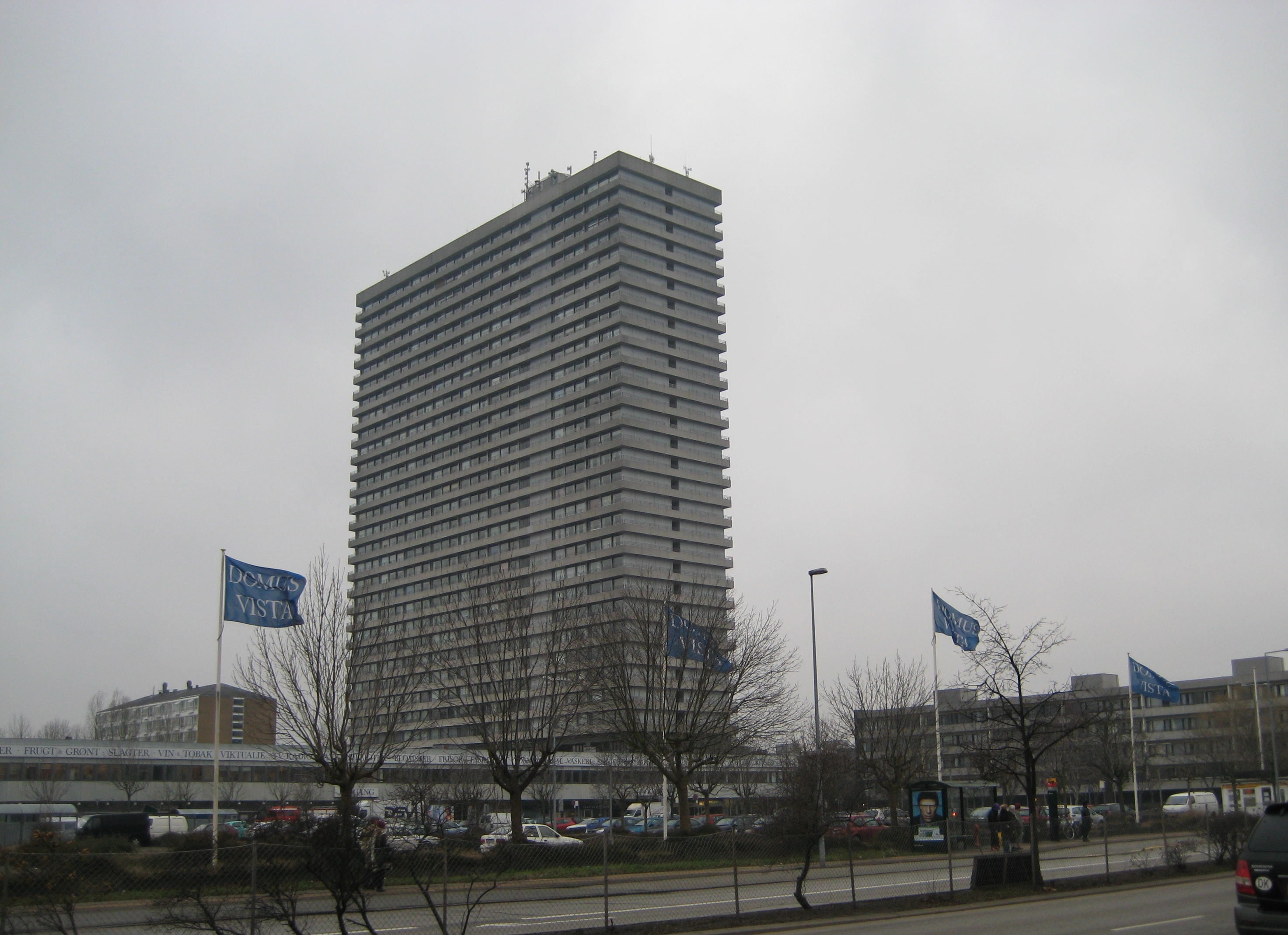 Højhuset Domus Vista med 5 flagstænger i forgrunden. Der er desværre kun 4 flag på. De 5 flag respræsenterer de nordiske lande Danmark, Norge, Sverige, Finland og Island. Adressen på Domus Vista er Nordens Plads.